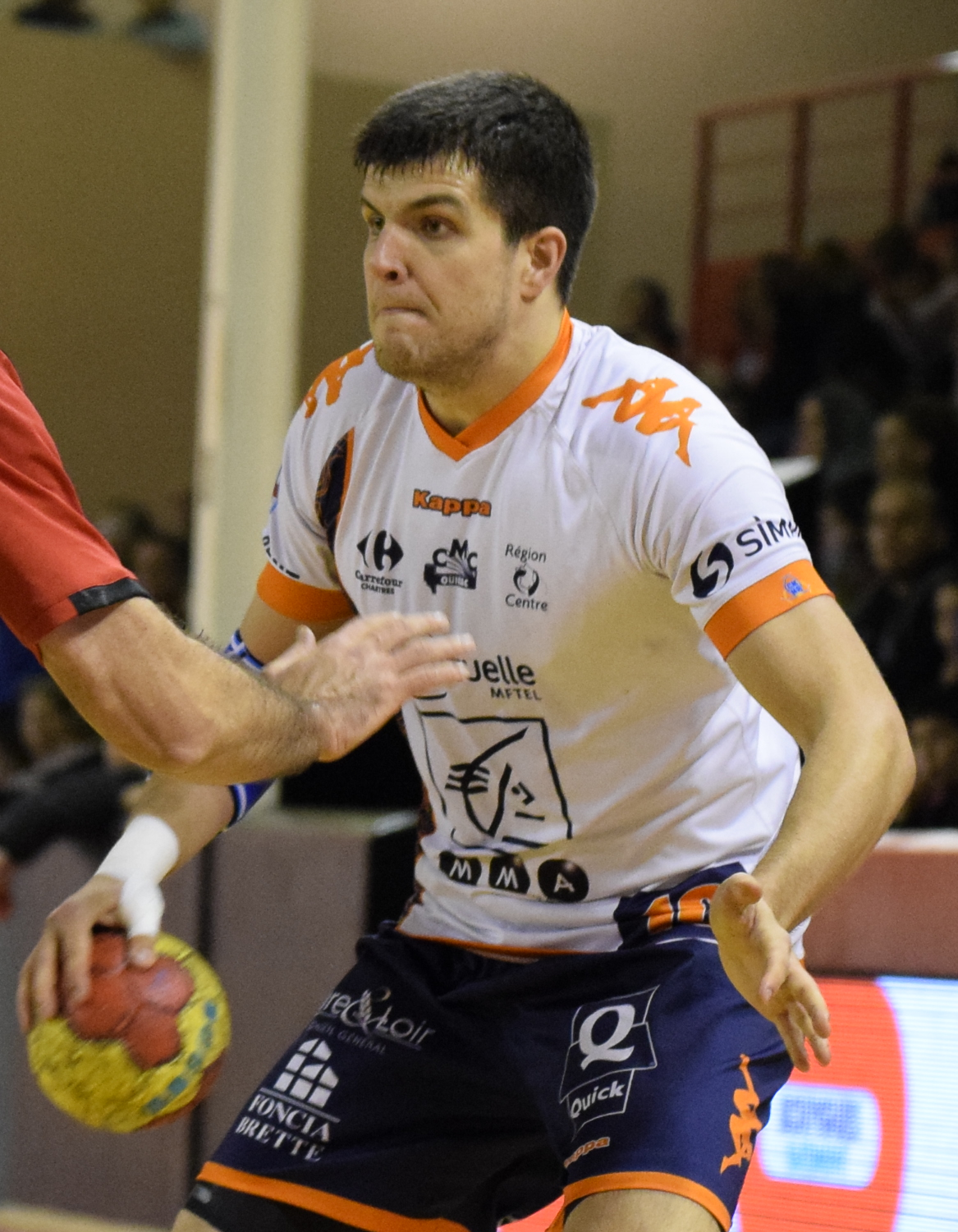 Rencontre de ProD2 entre l'US Ivry handball et Chartres HB. A Ivry, le 06 décembre 2014.